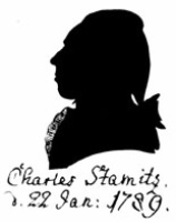 Carl Stamitz